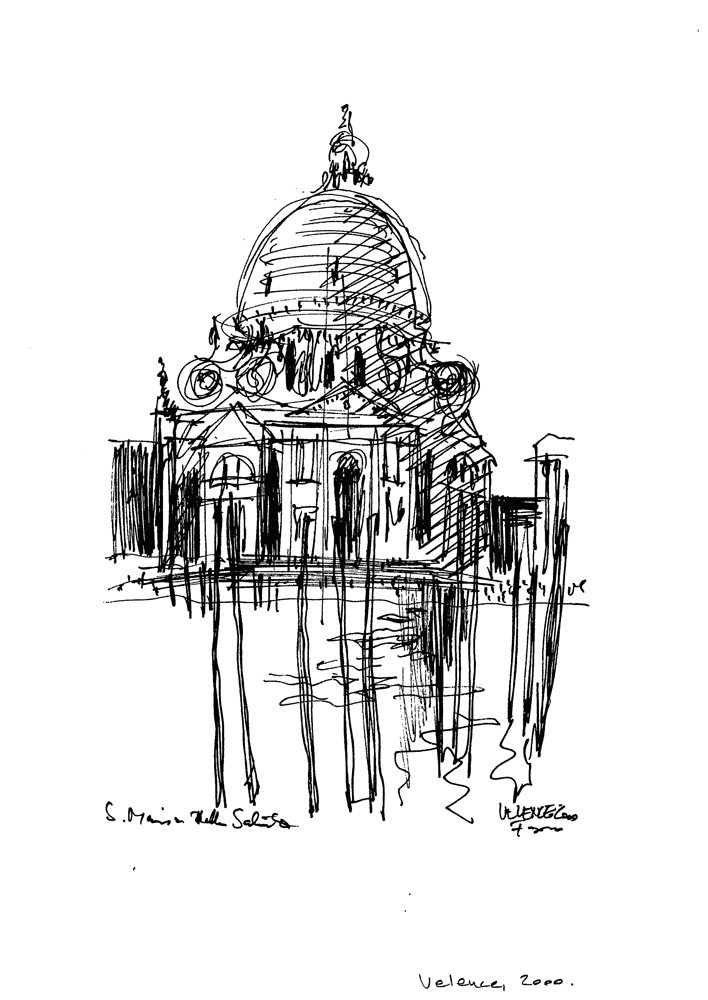 Velence, Olaszország (útirajz)